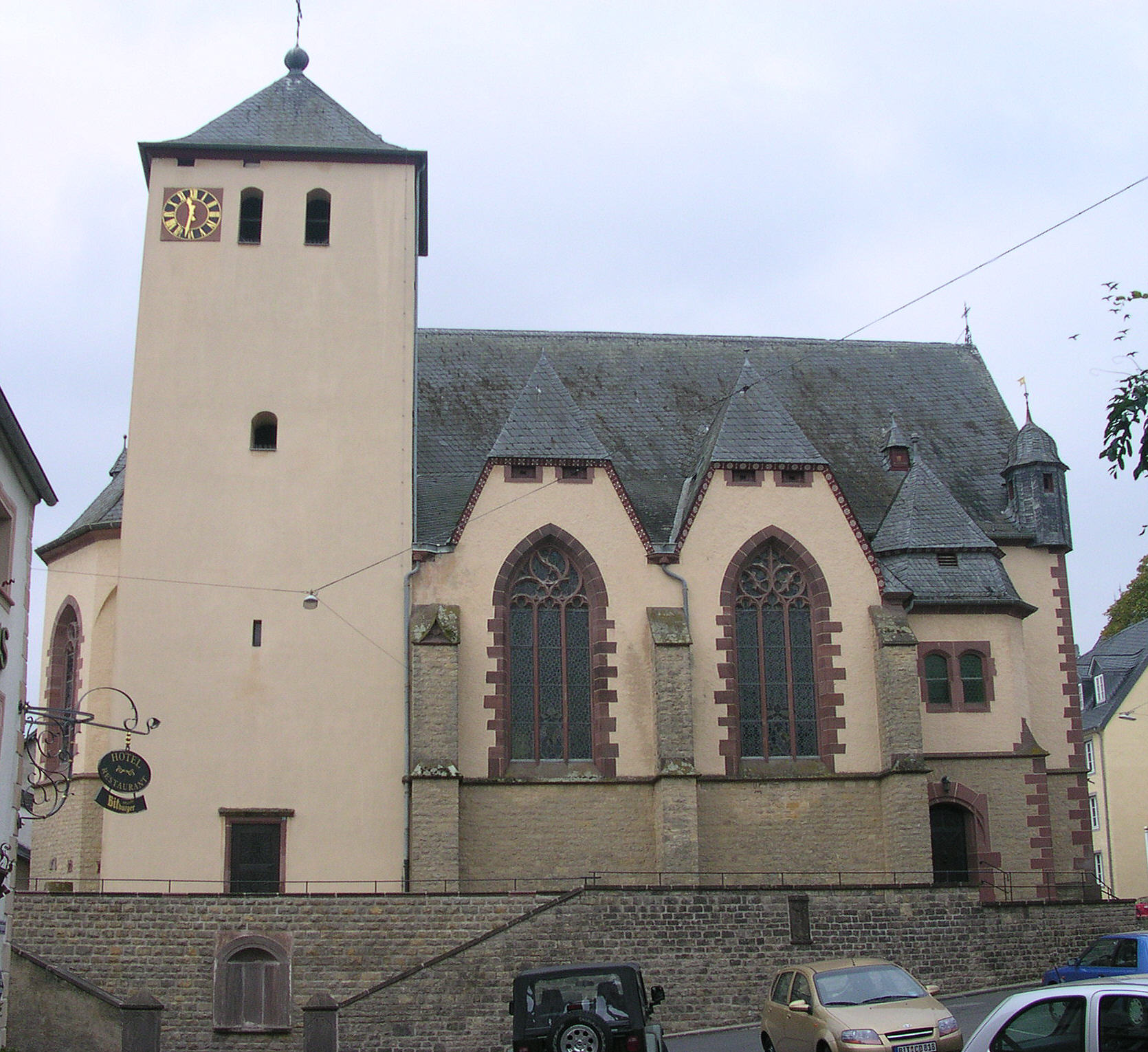 Dudeldorf, römisch-katholische Pfarrkirche St. Maria Königin